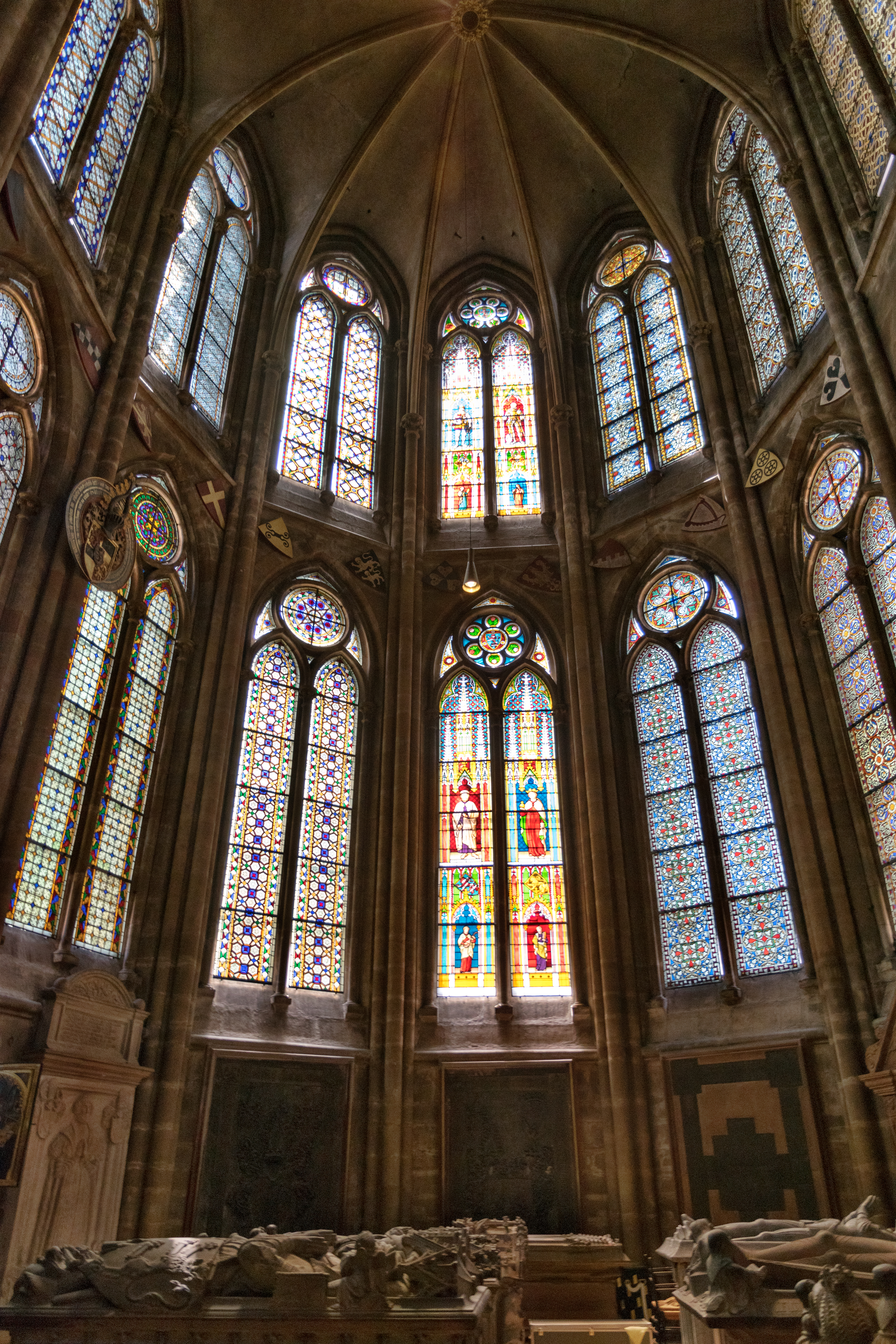 Interieur der Marburger Elisabethkirche